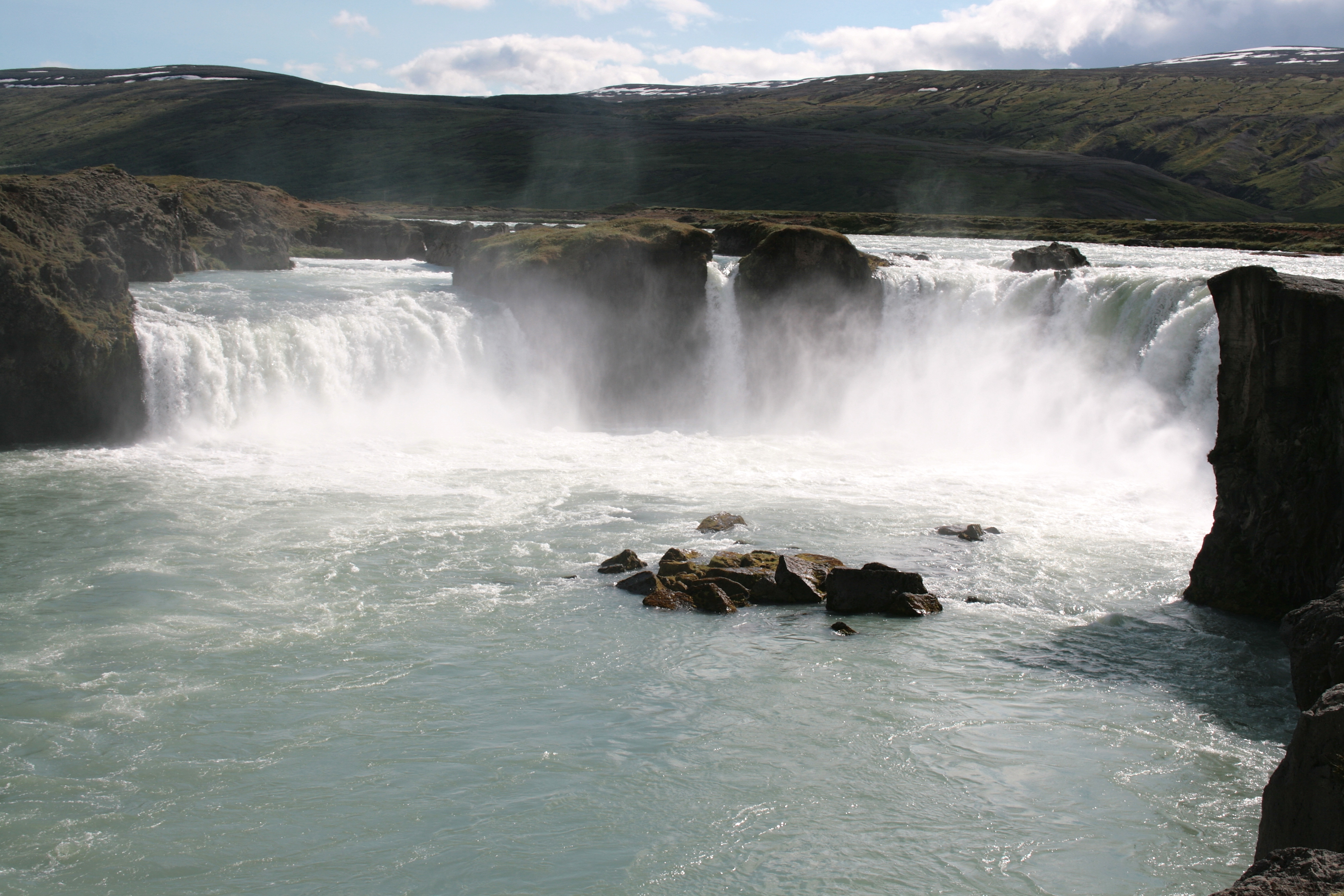 Godafoss